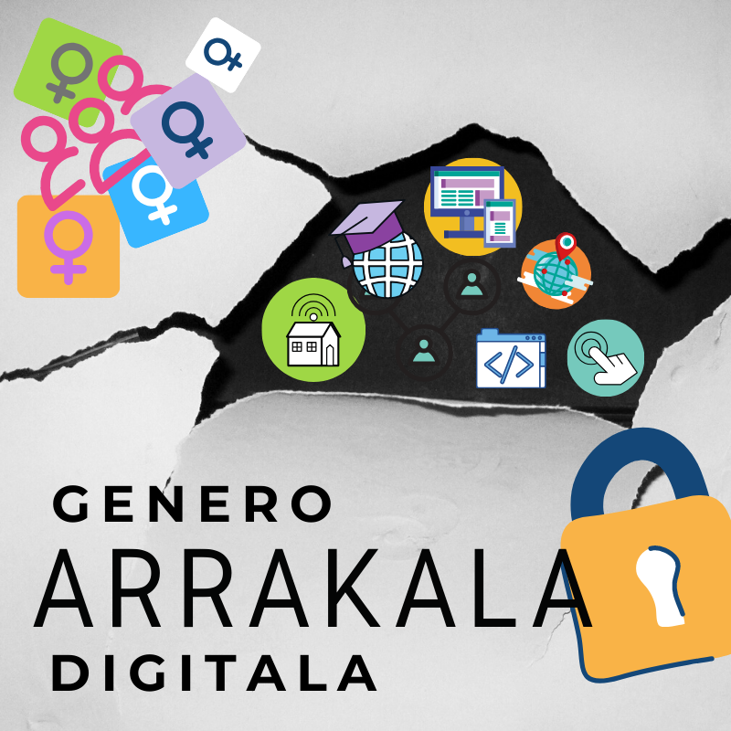 Genero arrakala edo eten digitala interneterako sarbide zein erabilera mailan gizonen eta emakumeen arteko aldea da.